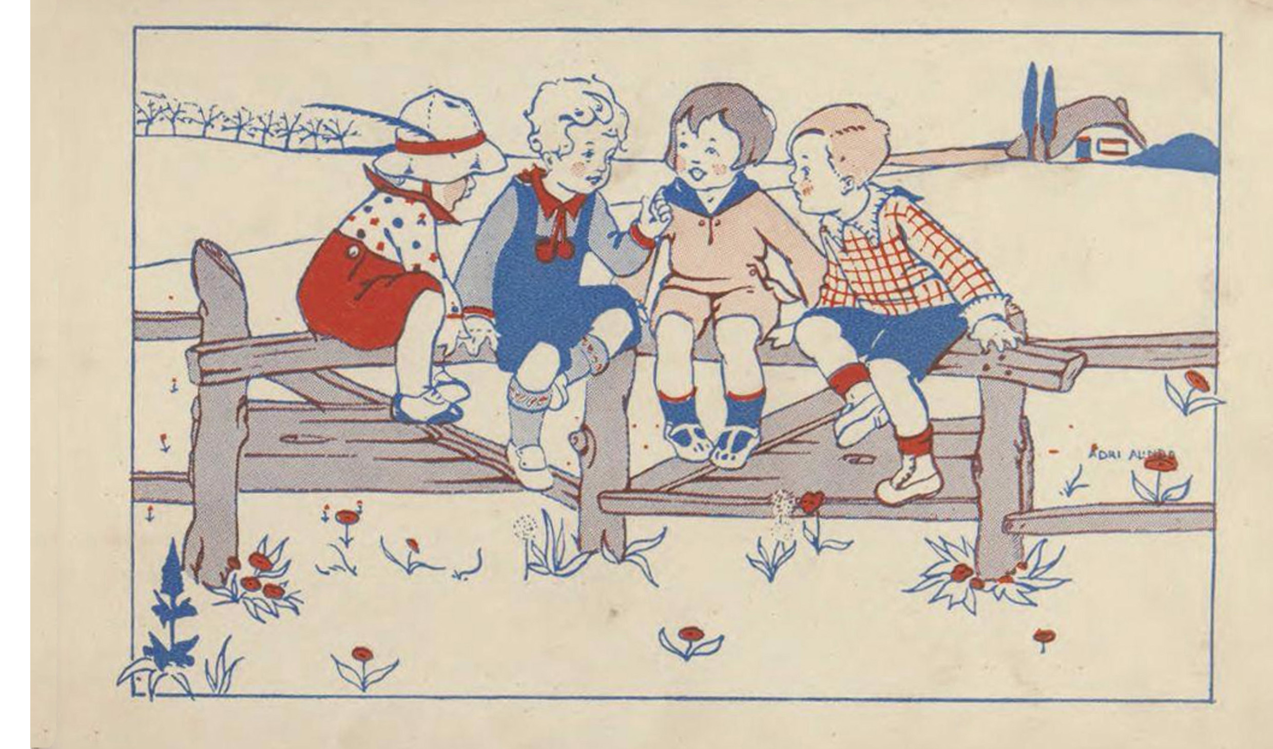 Illustratie uit een bepaalde periode